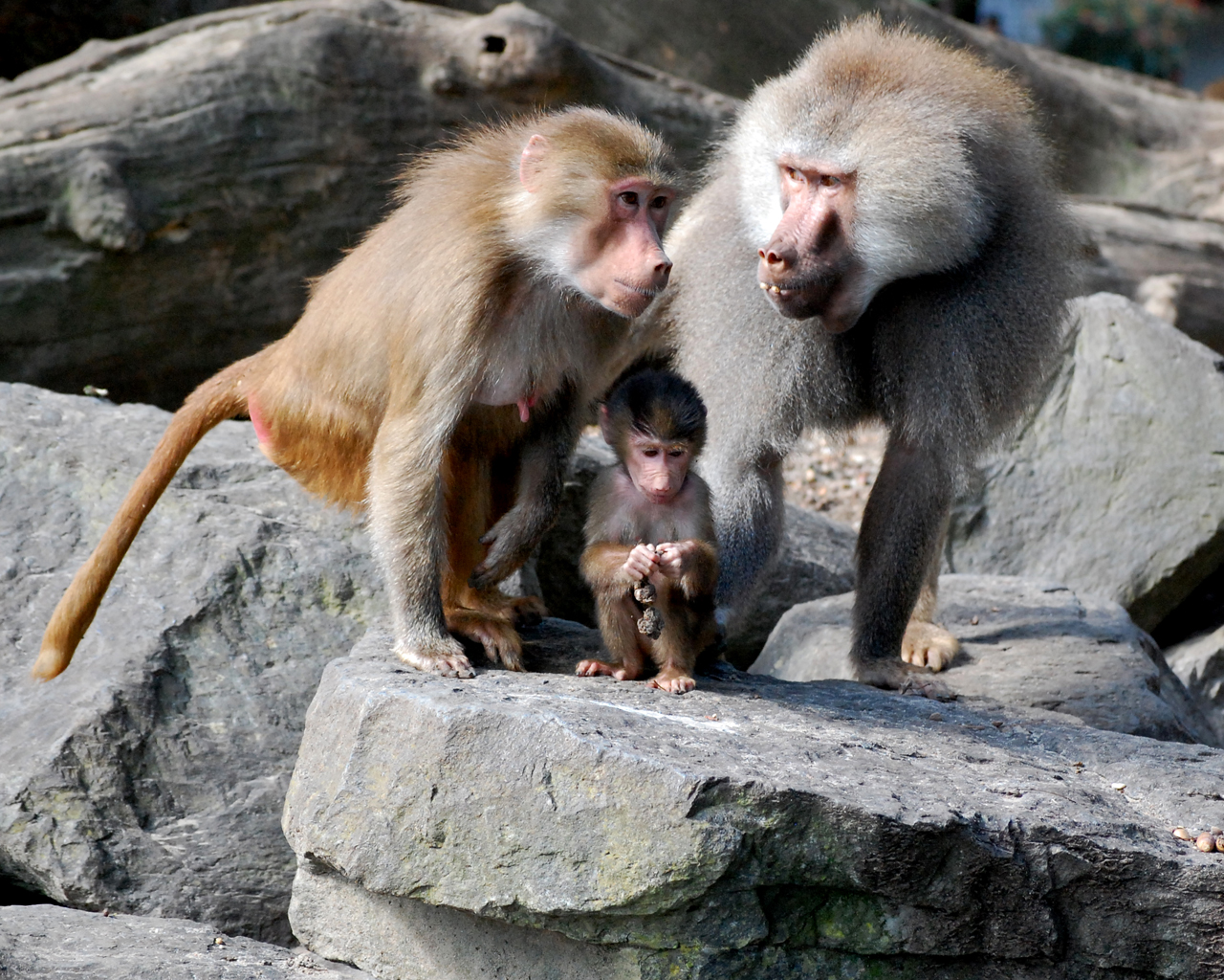 Bavianenfamilie te Dierenpark Emmen